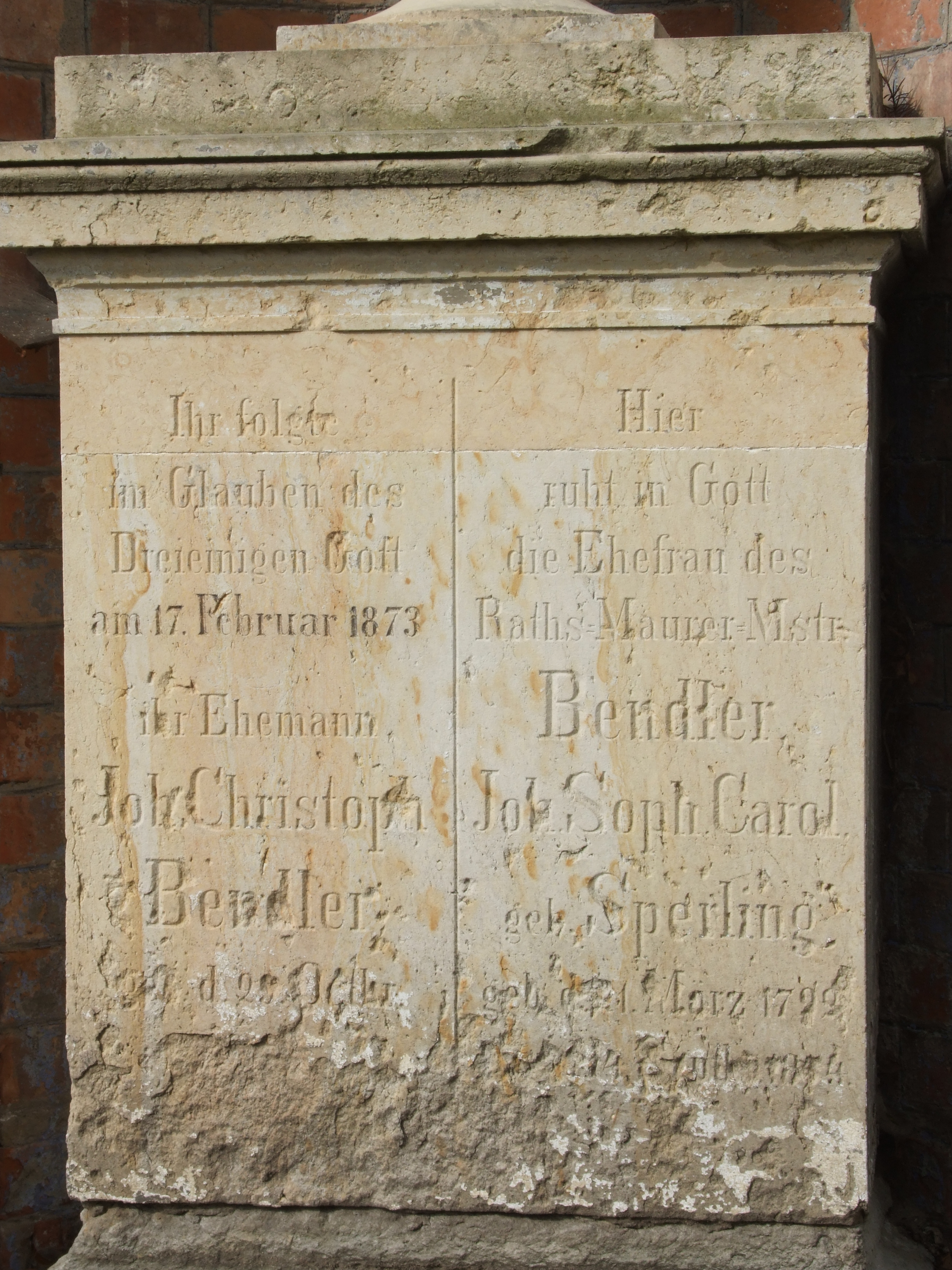 Inschrift auf dem Postament des Grabes von Johann Christoph Bendler (29.Oktober 1789 - 17.Februar 1873) und seiner Frau auf dem Friedhof der Dom-Gemeinde, Liesenstraße 6, Berlin.